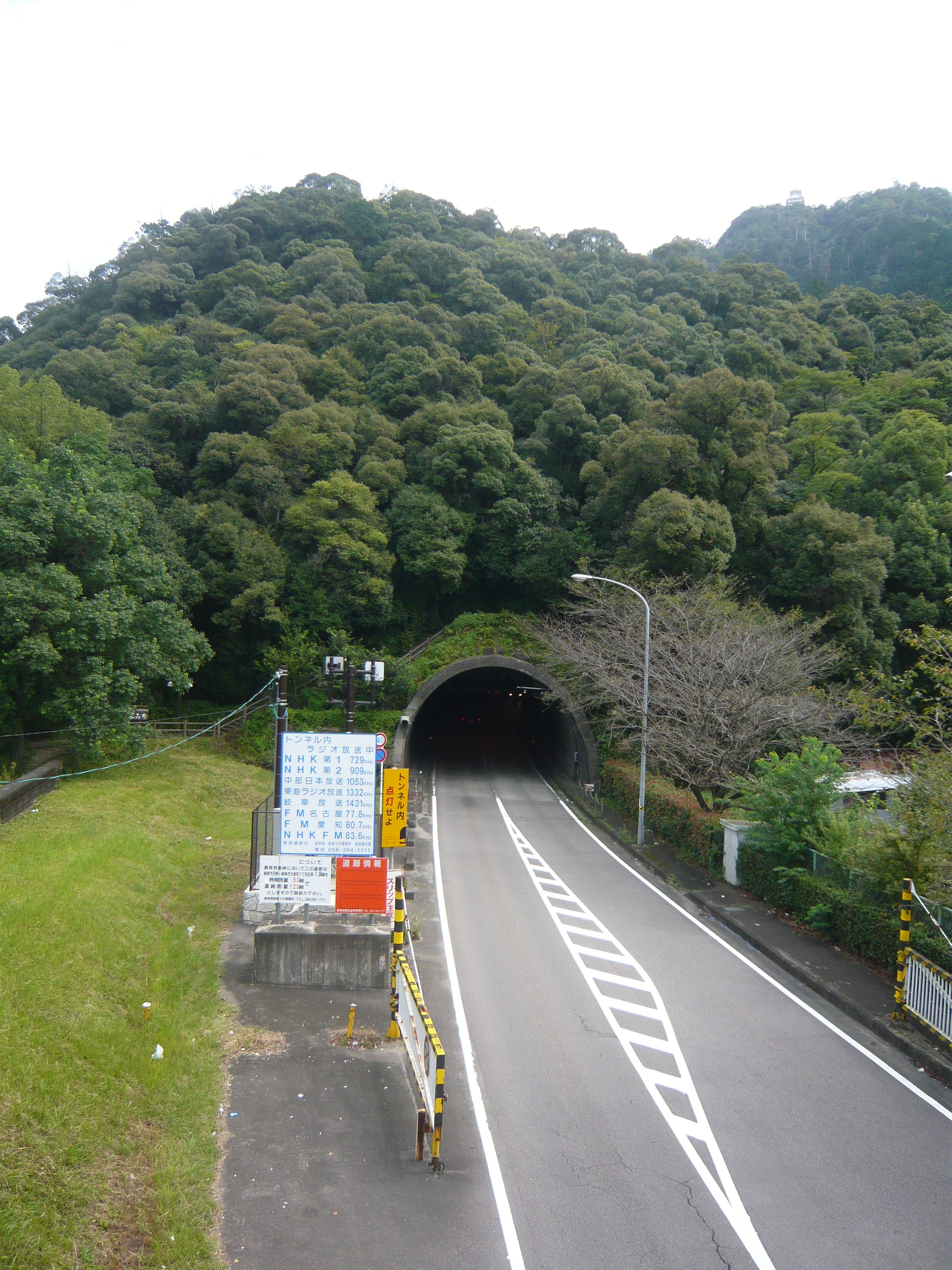 Kinkazan Tunnel（金華山 (岐阜県)の金華山トンネル）,Gifu,Gifu(岐阜県岐阜市)で撮影。